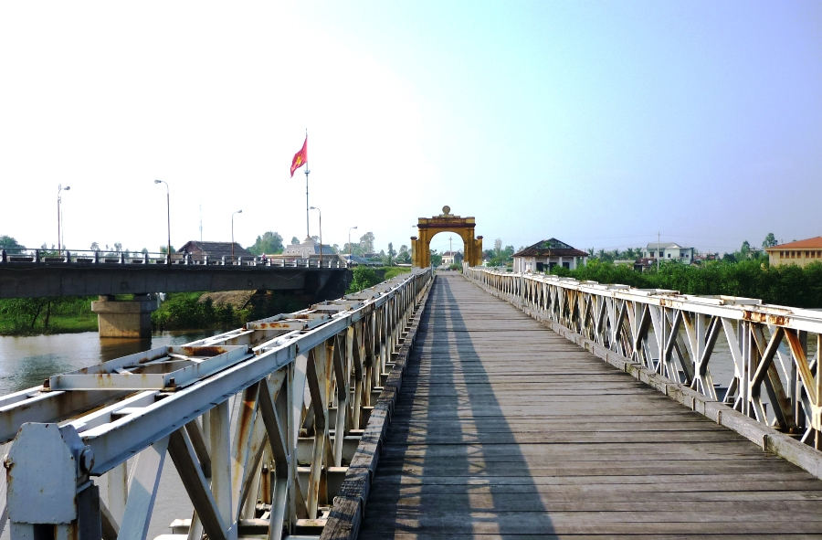 Cầu Hiền Lương